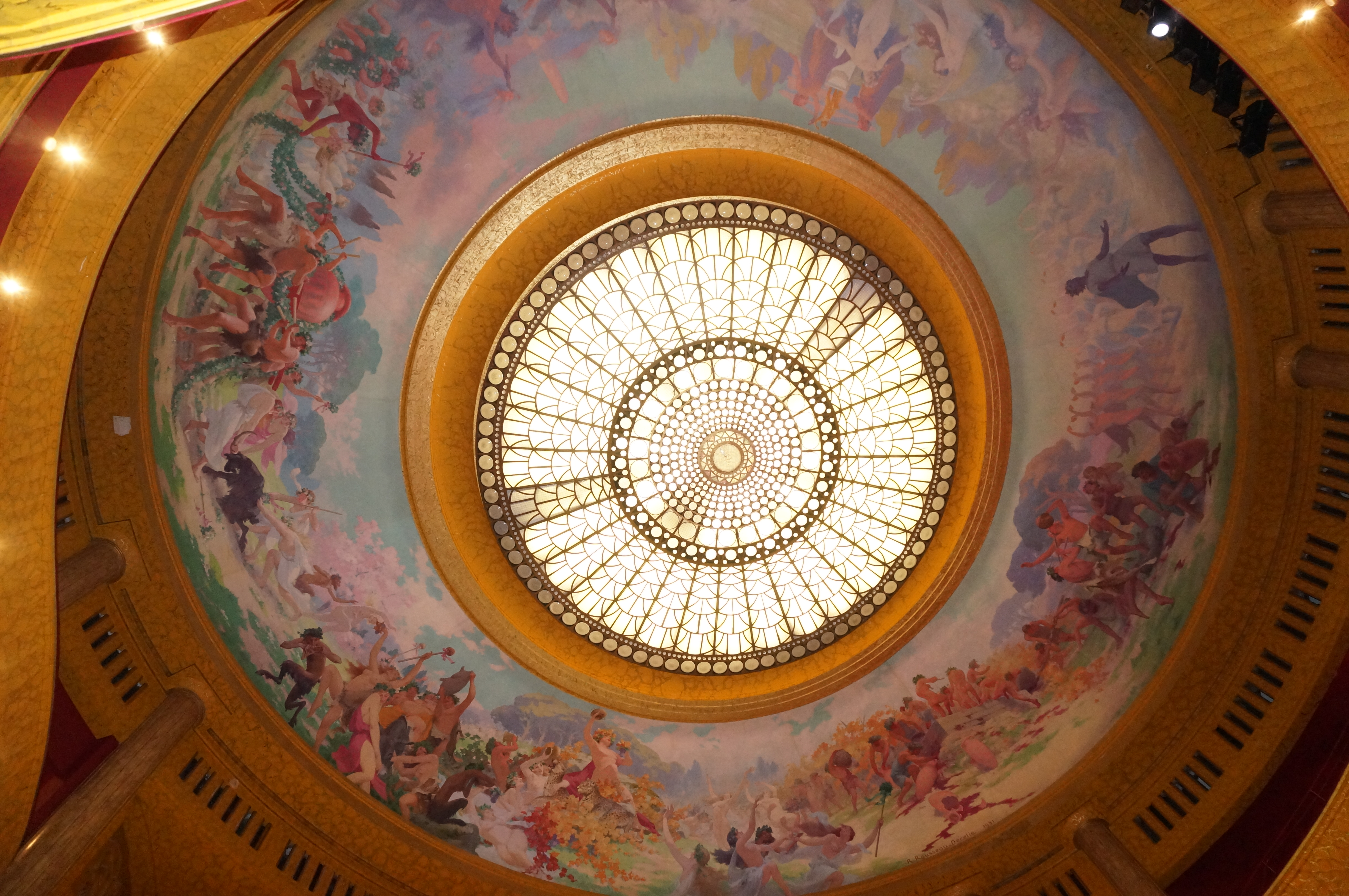 plafond de la salle de spectacle du Théâtre de Reims.